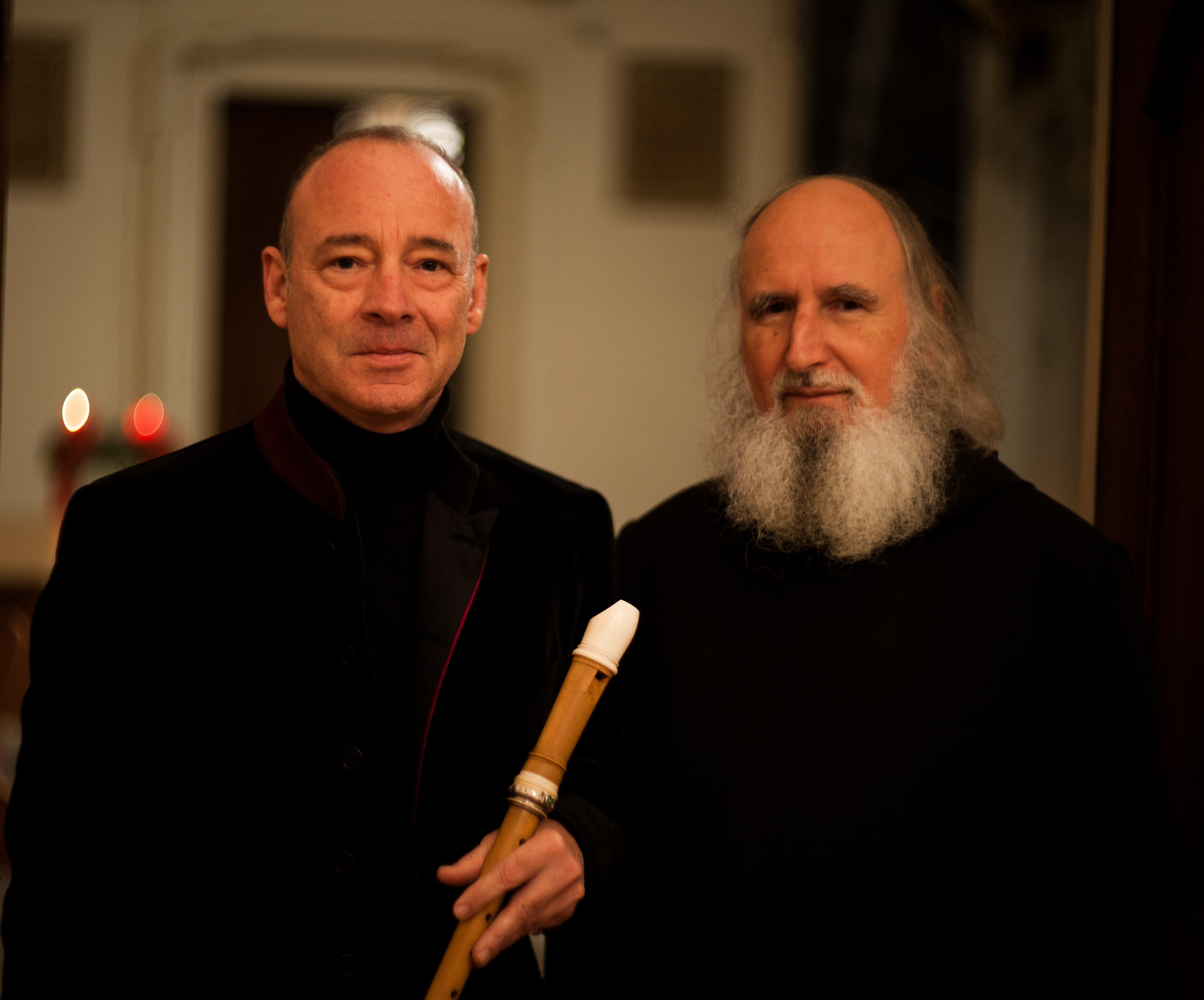 Hans-Jürgen Hufeisen, Komponist; zusammen mit Pater Anselm Grün, Schriftsteller; 2011 in Ludwigsburg